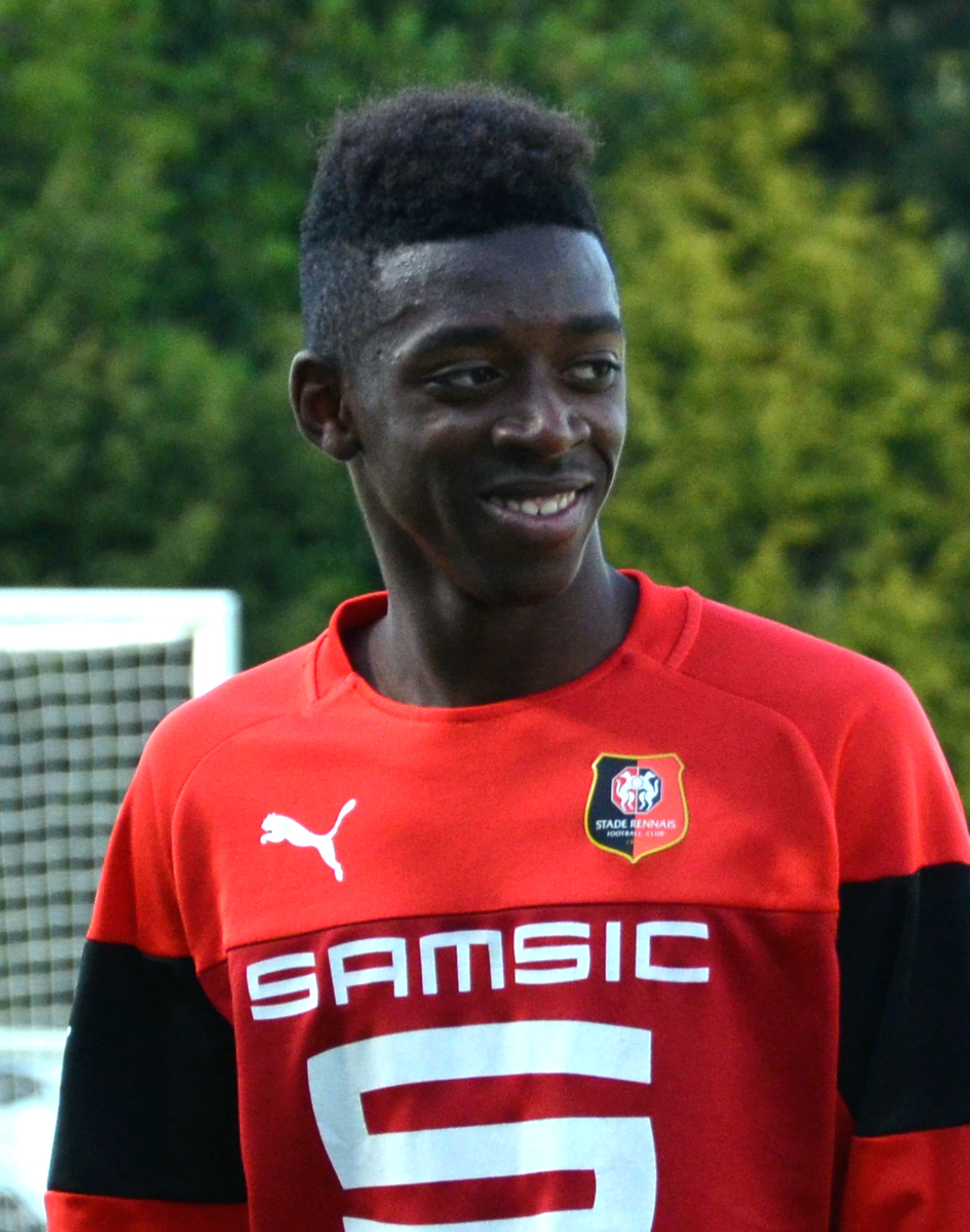 Photographie d'Ousmane Dembélé lors d'un match de CFA2 opposant le FC Saint-Lô au Stade rennais le 23 mai 2015.